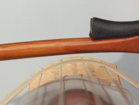 Curved Bow and bridge